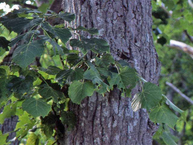 シナノキ、北海道・知床にて撮影 Tilia japonica en Shiretoko de Hokkaido, Japon